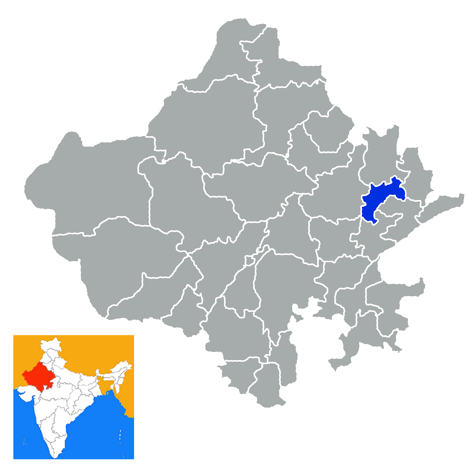 Distrito de Dausa Rajastan India